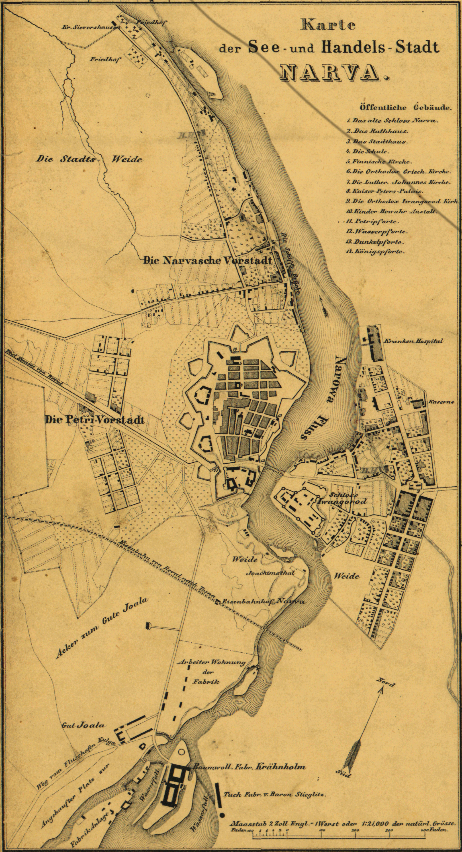 Narva linnaplaan, 1876